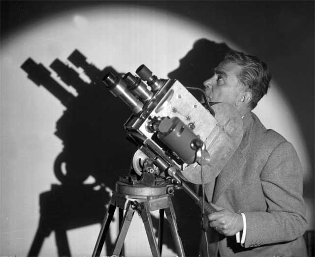 Fernando López Heptener en su estudio